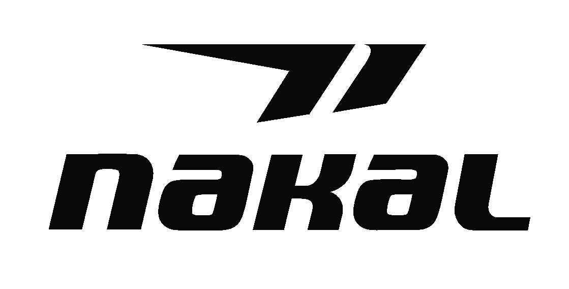 nakal 2018